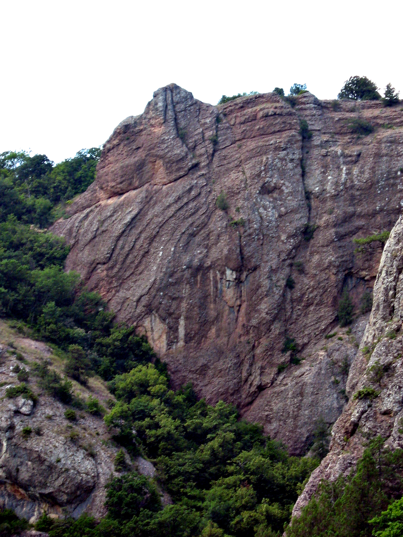 Красный камень. Село Краснокаменка (Кизилташ) феодосийского горсовета. Крым. Украина.